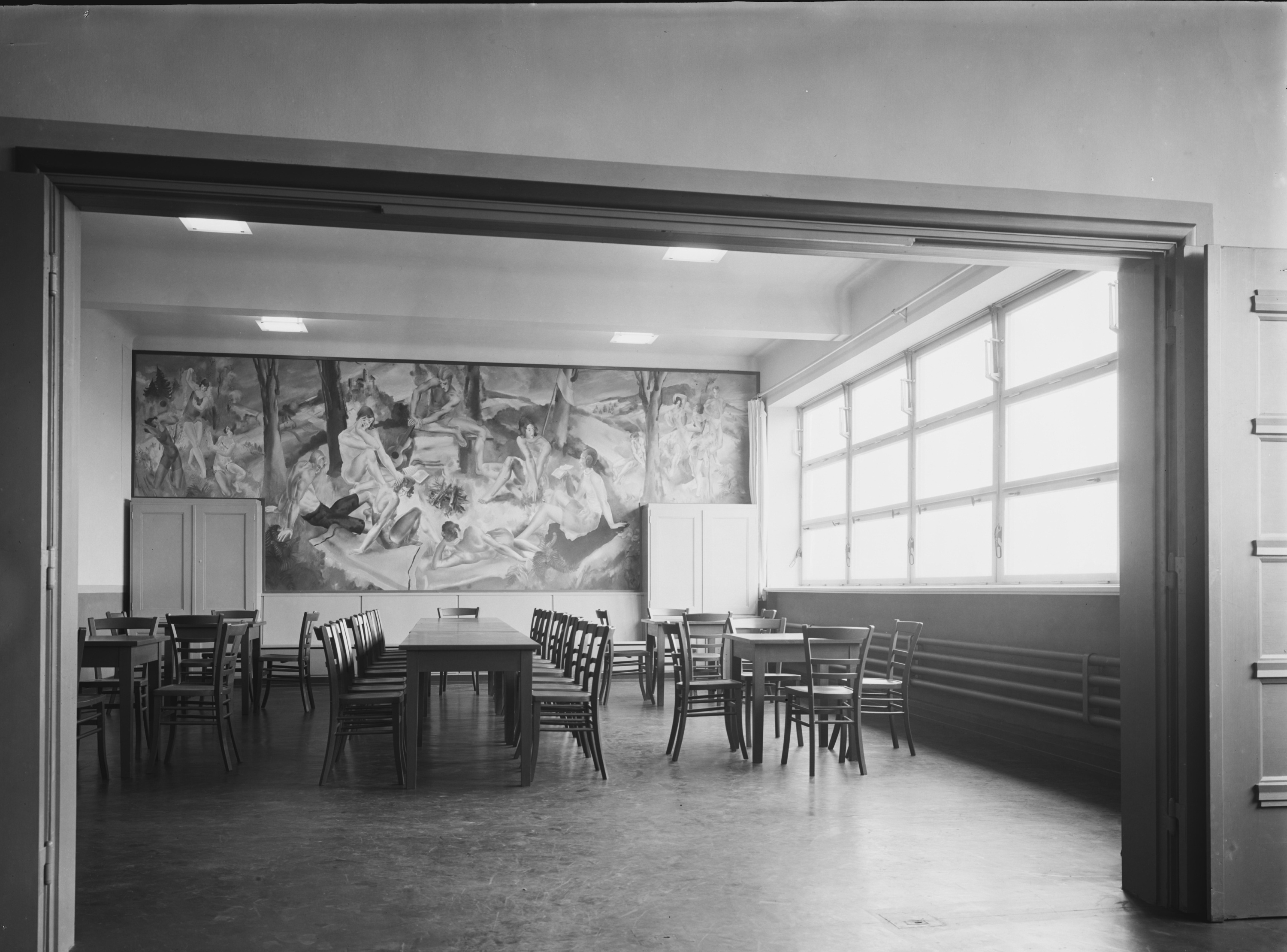 Schule Uferstraße (Hamburg-Hohenfelde): Aufenthaltsraum SchumacherWV Nr. 176